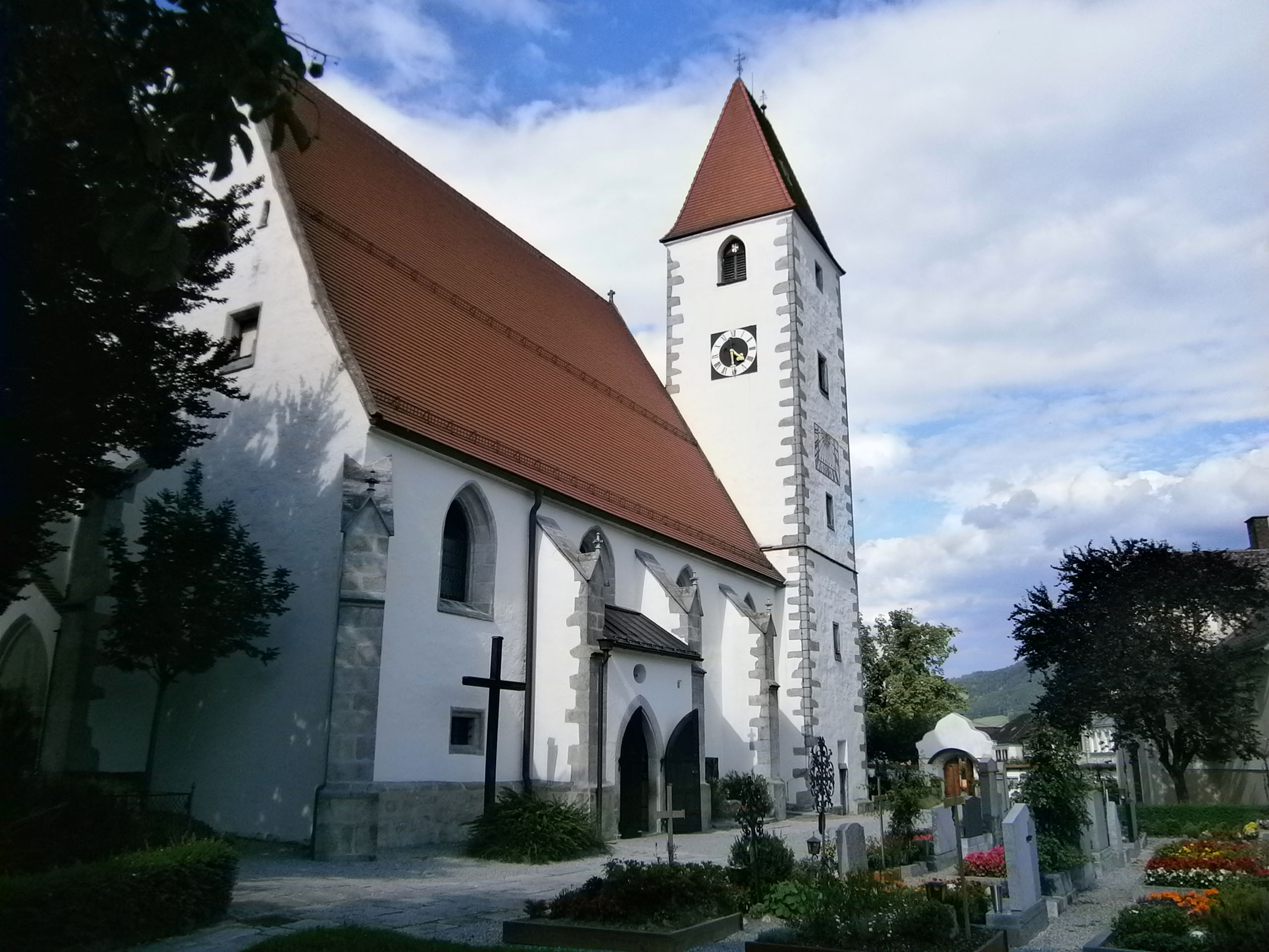 Object location48° 28′ 16.58″ N, 14° 32′ 25.57″ E